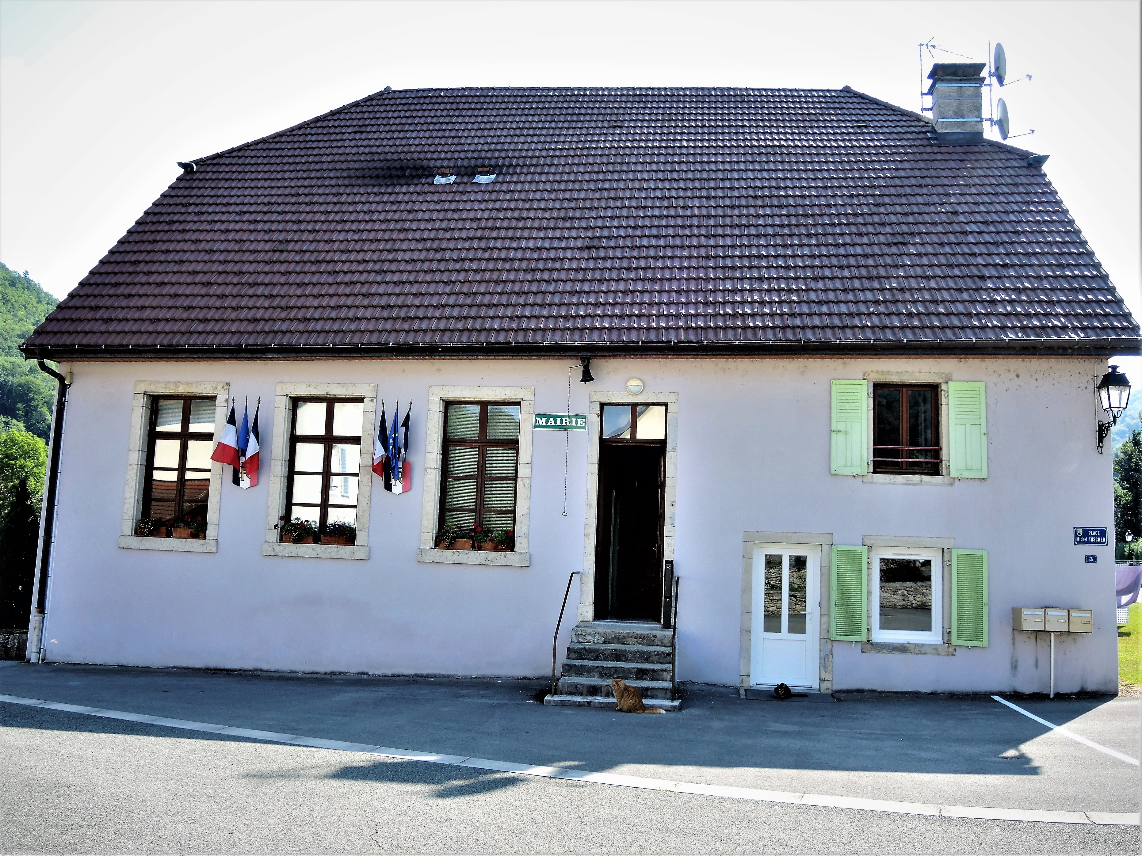 Façade de la mairie de Soulce-Cernay. Doubs